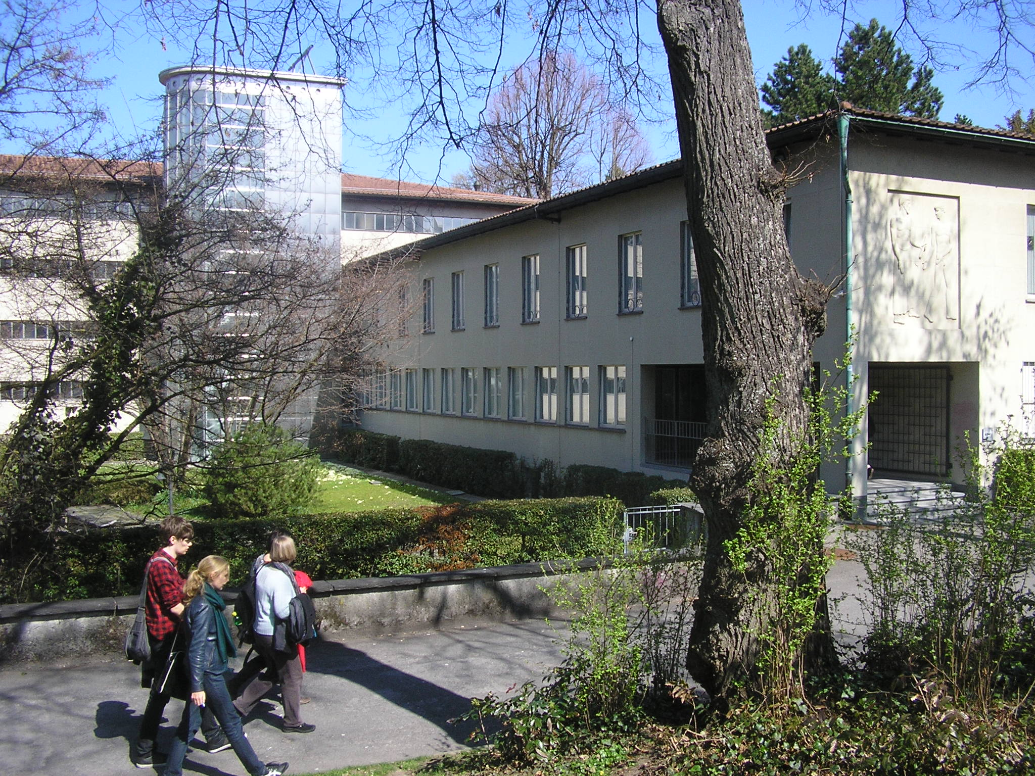 Falkenplatz 4 : Das Hauptgebäude des Staatsarchiv Bern, erbaut von Walter von Gunten (1891-1972) in 1939.